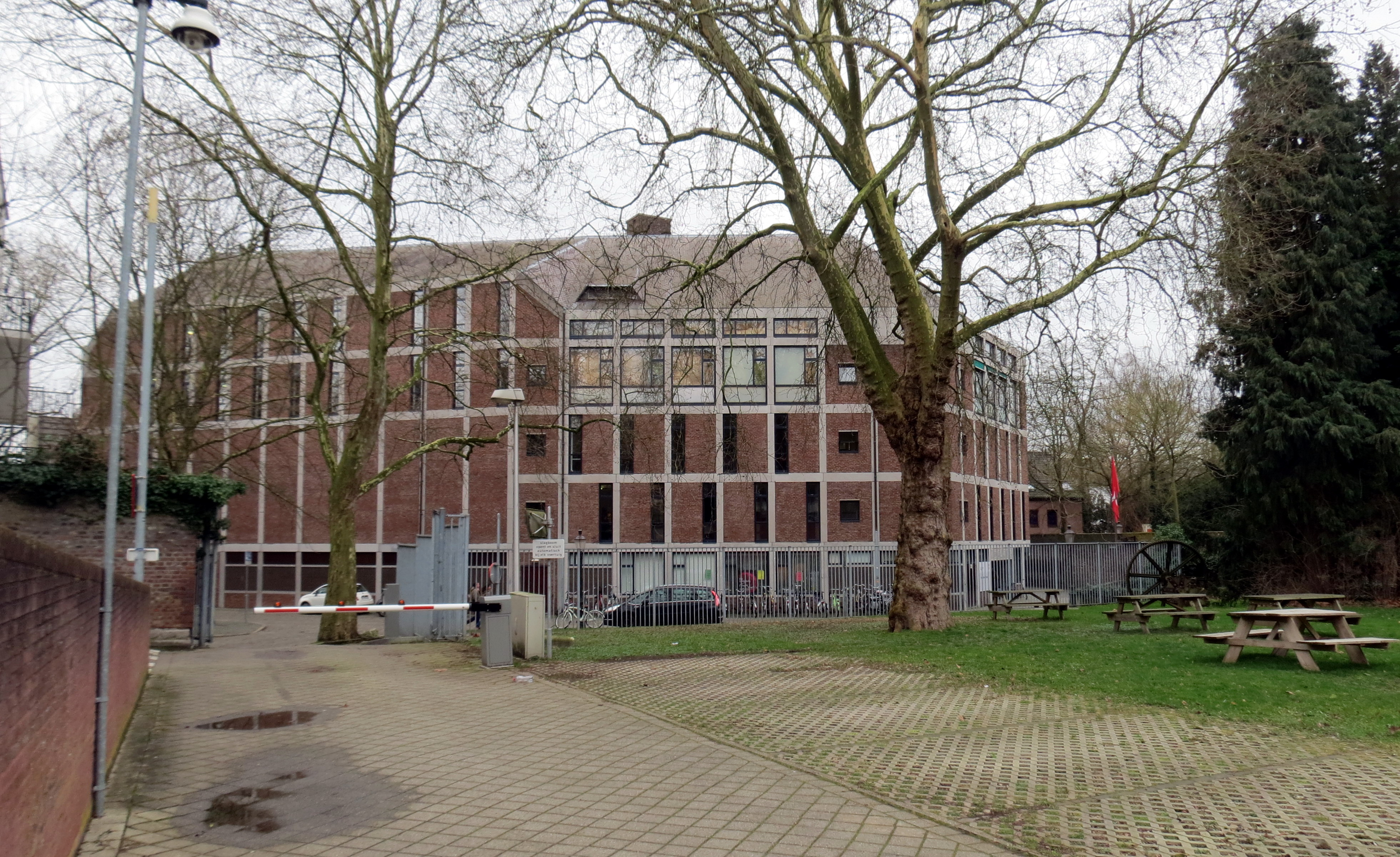 Zicht op de noordelijke vleugel, de westgevel, van het conservatorium, foto genomen vanaf het kruithuis.